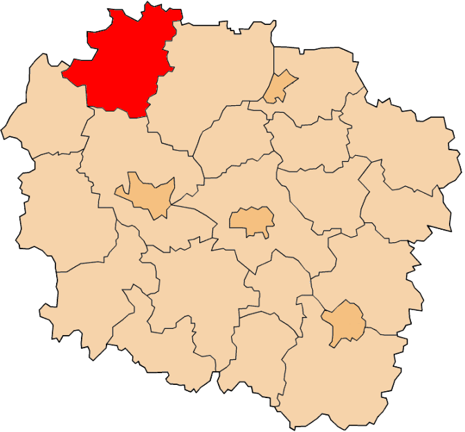 Powiat tucholski na mapie województwa kujawsko-pomorskiego.